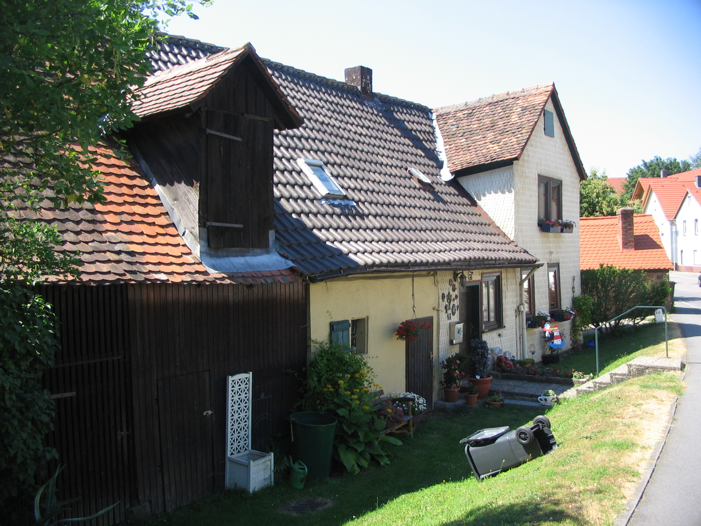 Denkmalgeschütztes Einhaus in der Dreiseetalstraße 47 in Dorf-Erbach